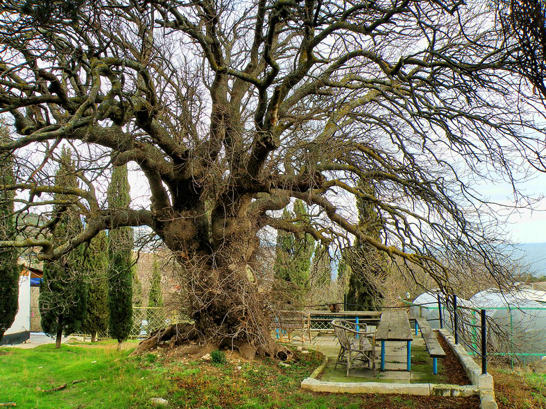 Фисташка Юстиниана